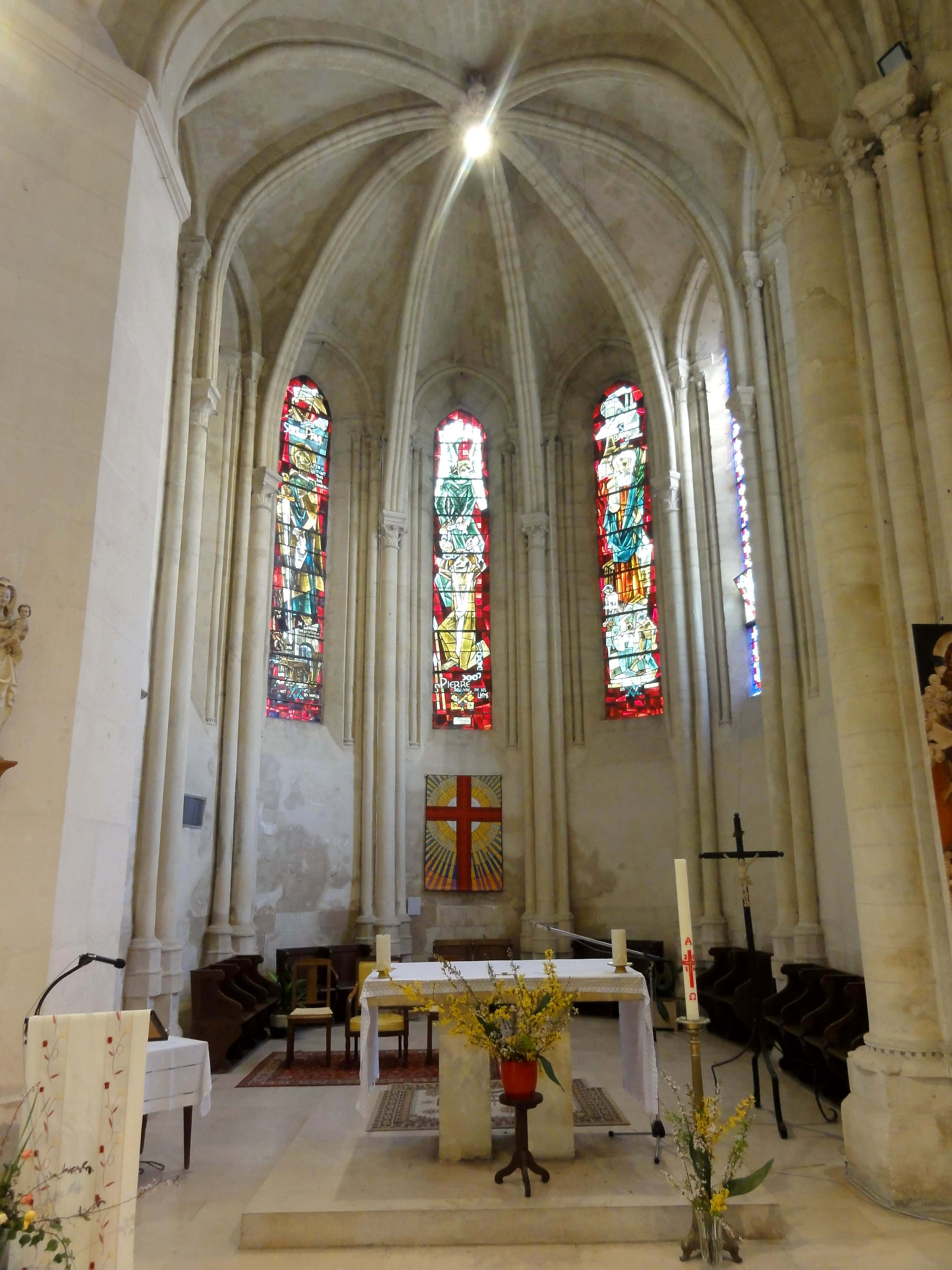 Intérieur de l'église - voir titre.